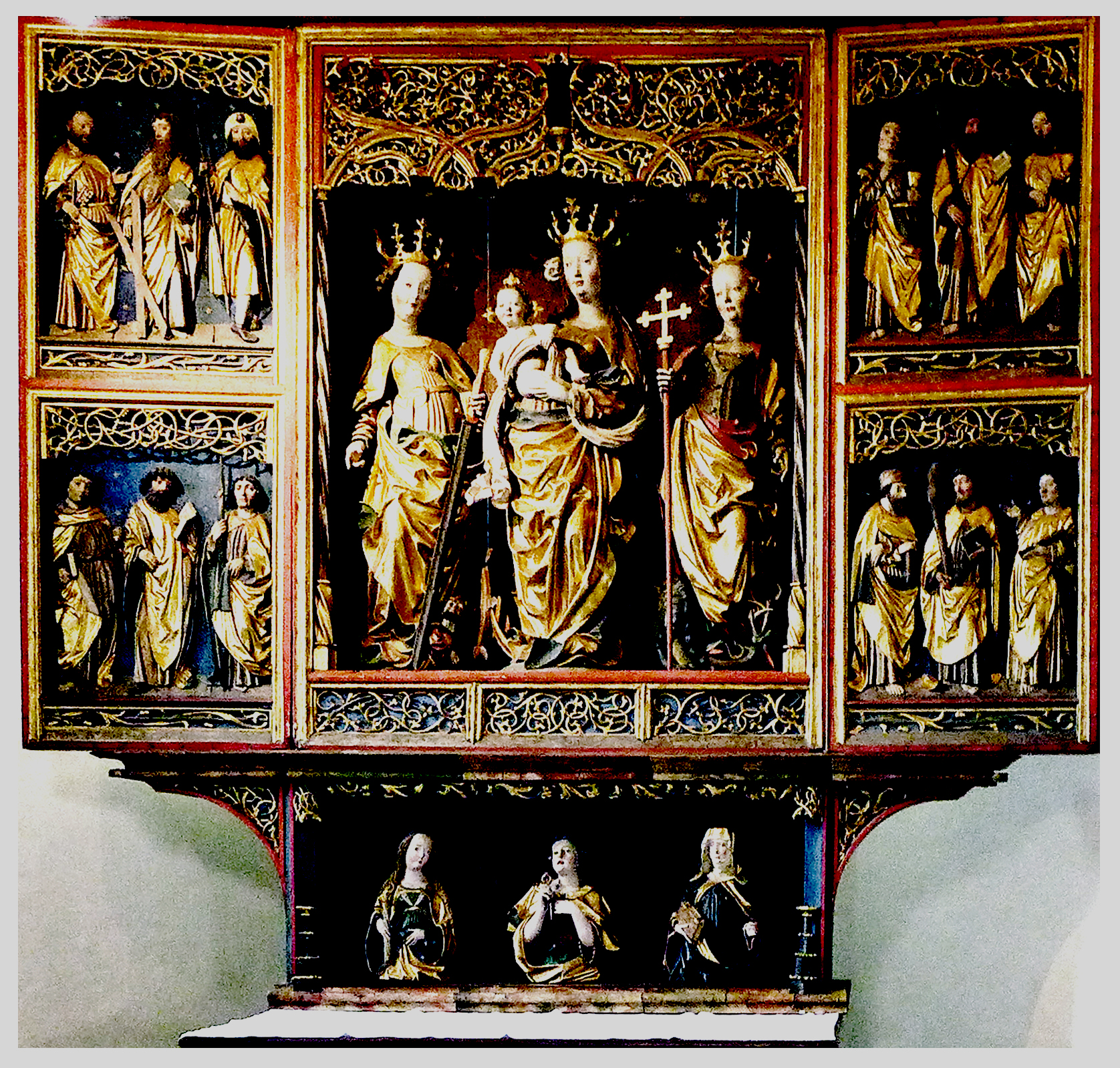 Ossiach plébániatemplomának szárnyas oltára (Ausztria)